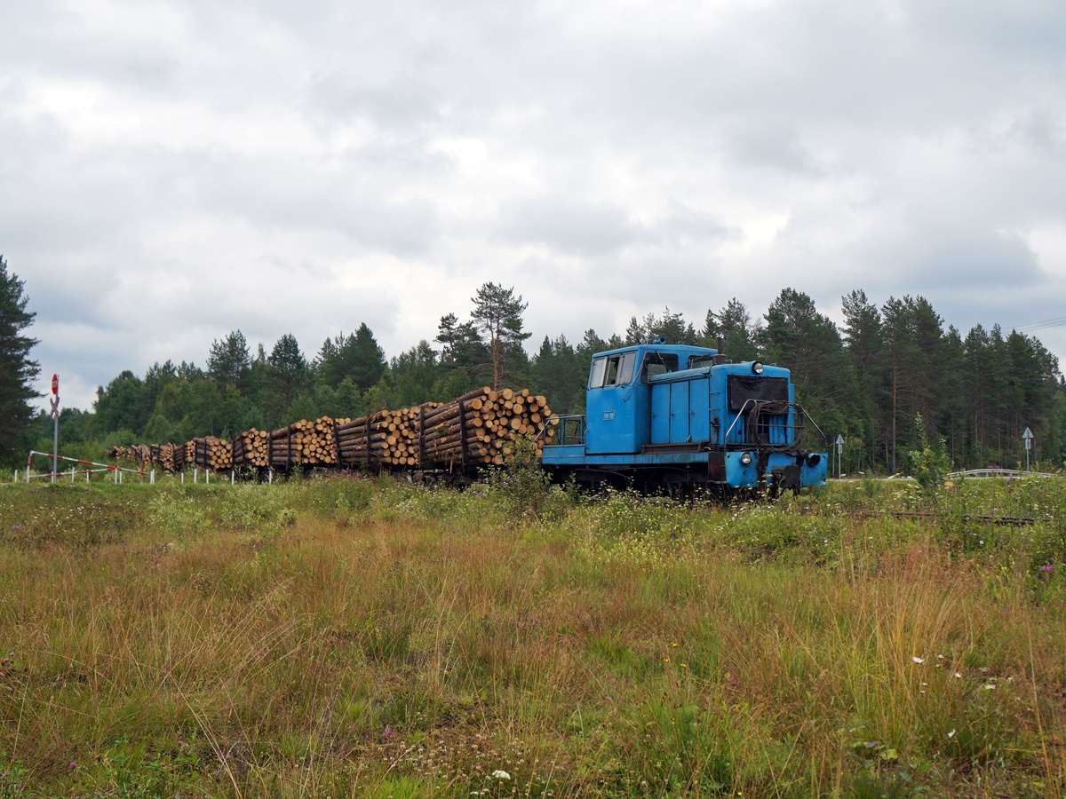 ТУ8-0064 с грузовым поездом на переезде через а/д Вологда-Вытегра